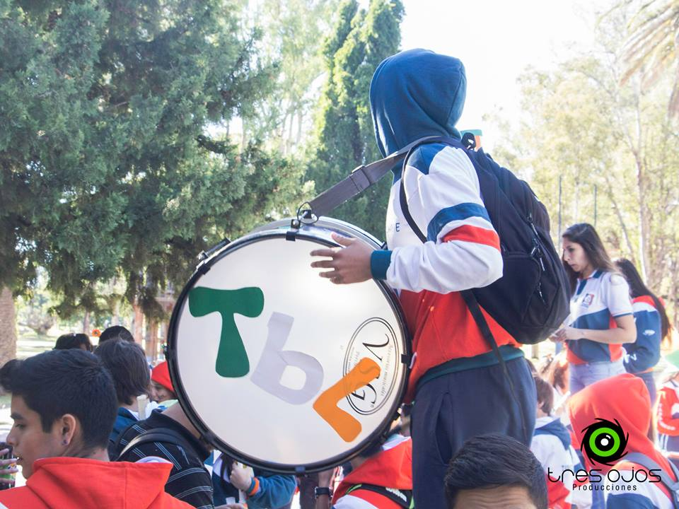 Presentación Tabaleros 2015 en el centro de la cuidad